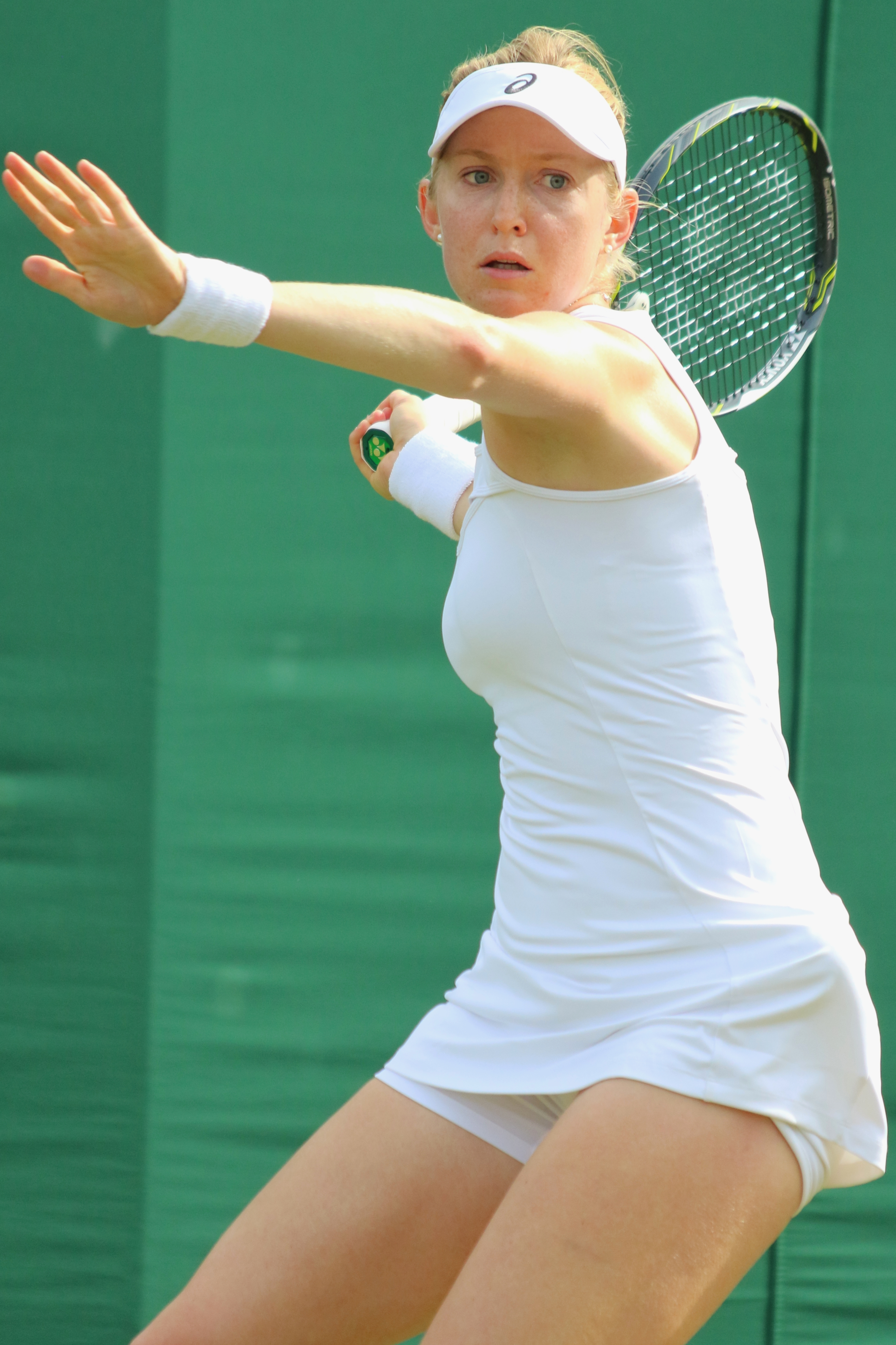 Boserup WM17 (15)